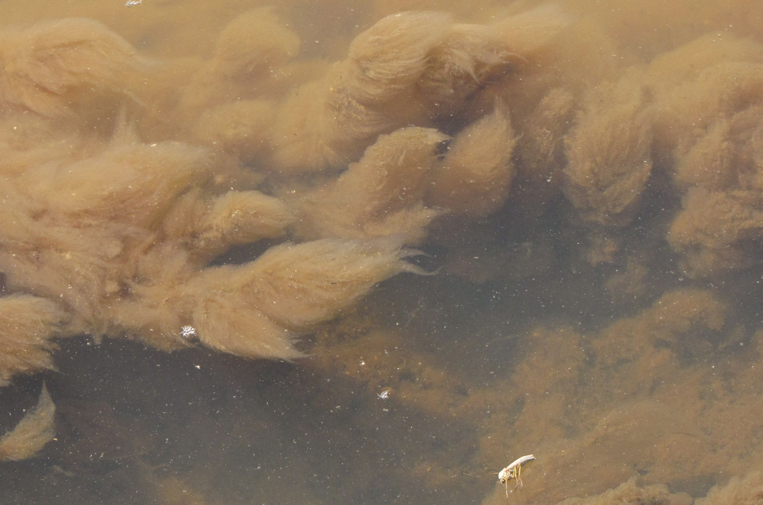 Abwasserpilz, Bucher Landgraben am Flughafen Nürnberg